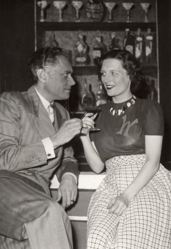 Cultuur tijdens de Tweede Wereldoorlog. Het Residentie-Toneel in de Princesse-Schouwburg in Den Haag met "Waar is mijn dochter" blijspel van Ank van der Moer met toneelspelers Ank van der Moer en Johan de Meester. Nederland, maart 1943.